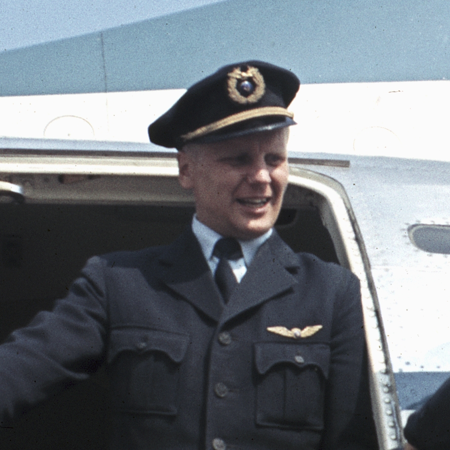 Lentokapteeni Jaakko Hillo Aero Oy:n Convair-matkustajakoneen portailla Pariisissa vuonna 1954.